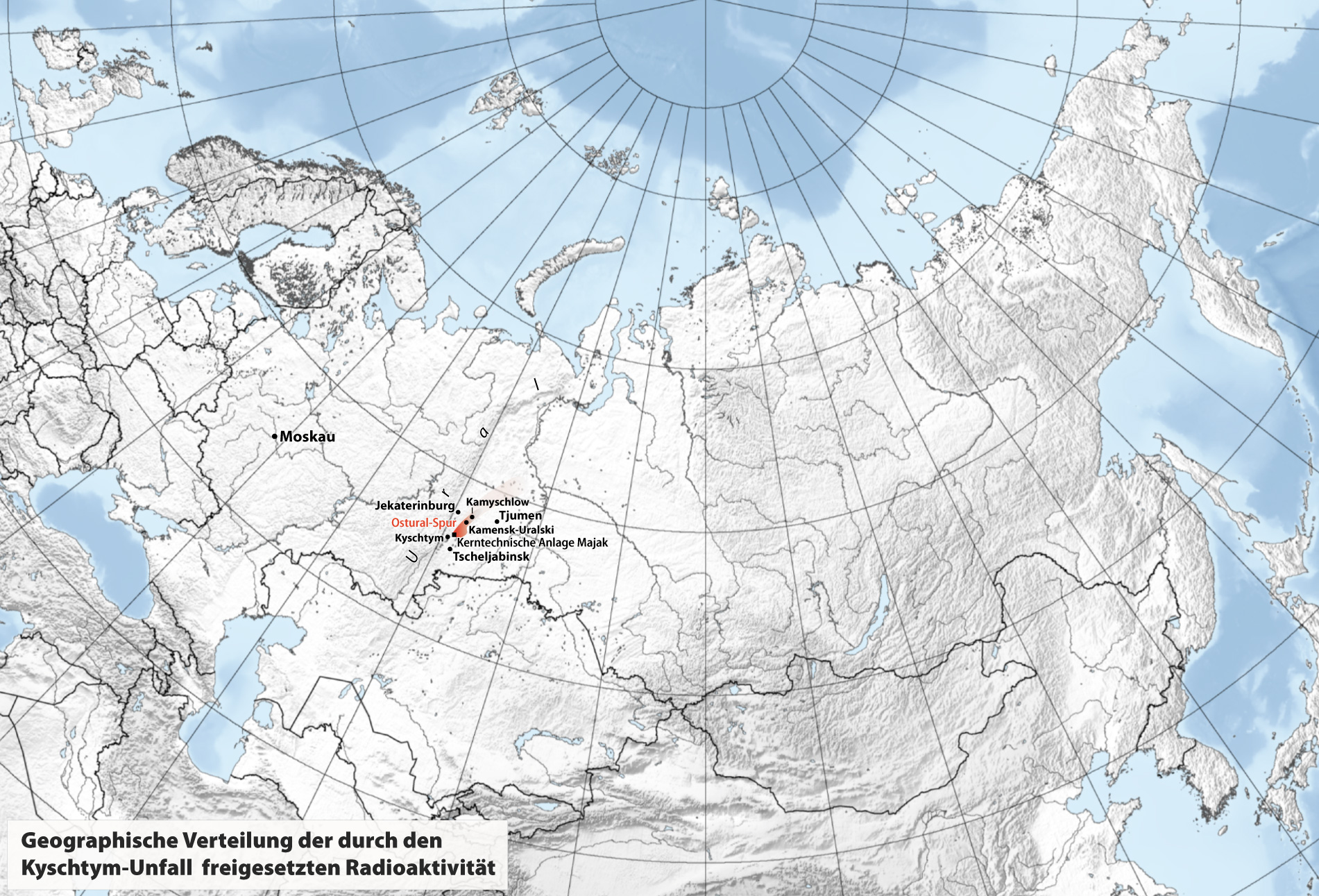 Geographische Verteilung der durch den Kyschtym-Unfall freigesetzten Radioaktivität (die sog. Ostural-Spur)